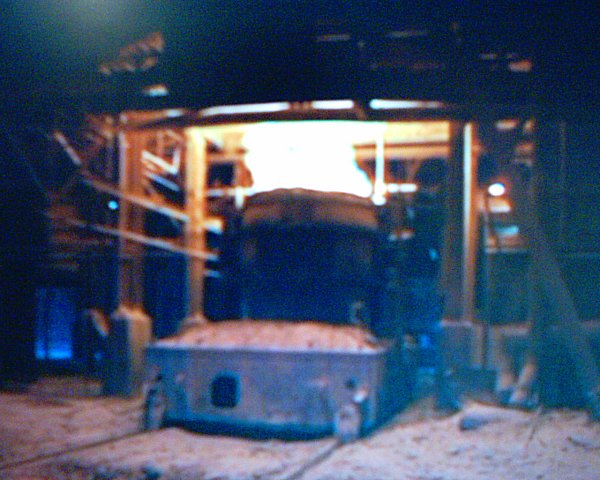 The Société Métallurgique de Normandie steel plant, Caen.